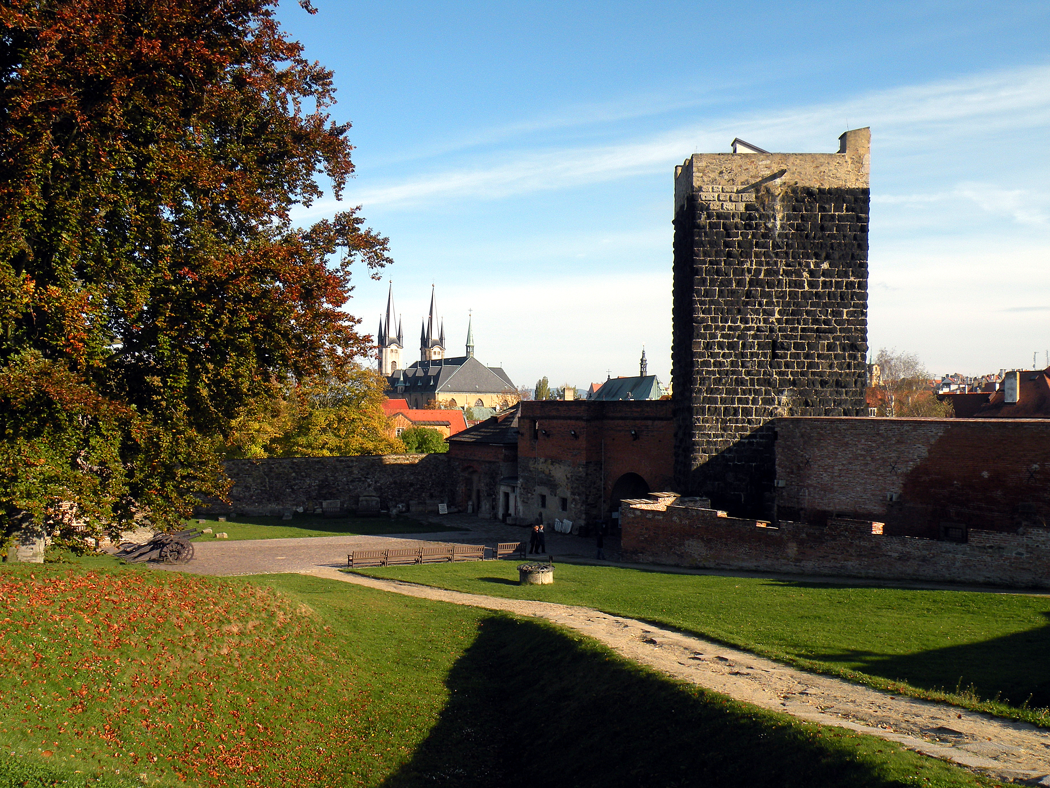 Егер.(Хеб). Чёрная башня замка.